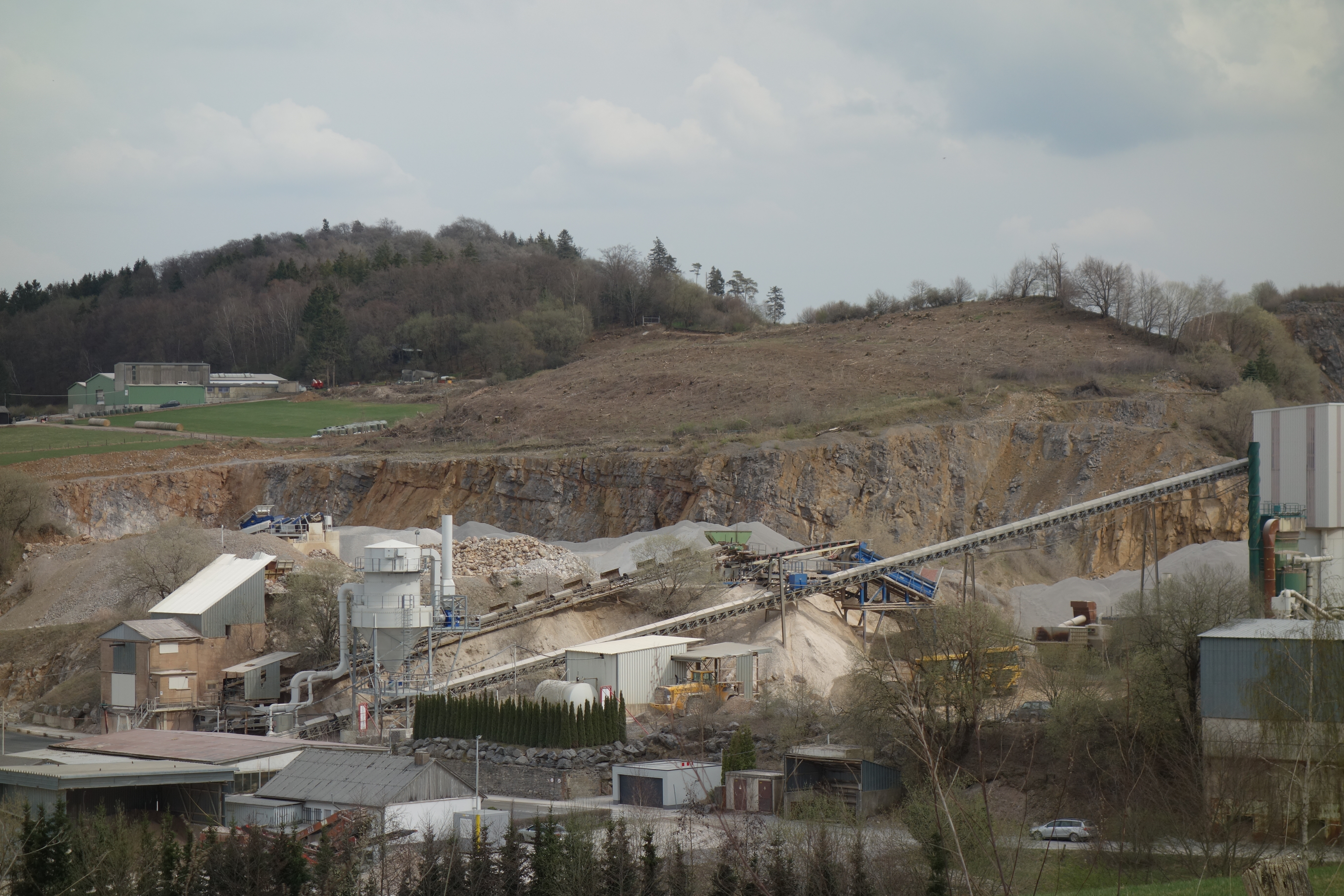 Oberhalb des Steinbruchs ist ein gerodeter Gehölzbereich im Naturschutzgebiet Burhagen zu sehen. Im Frühjahr 2017 wurden praktisch alle Gehölze im „Bereich für die oberirdische Gewinnung von Bodenschätzen“ abgesägt. Dieser Bereich war bei NSG-Ausweisung mit einer Befristung bis zum Abbaubeginn versehen worden. Nur an der Steinbruchkante bliebe einige wenige Gehölze belassen. In den geplanten Abbaubereich wurde Wege geschoben und mit Splitt befestigt.